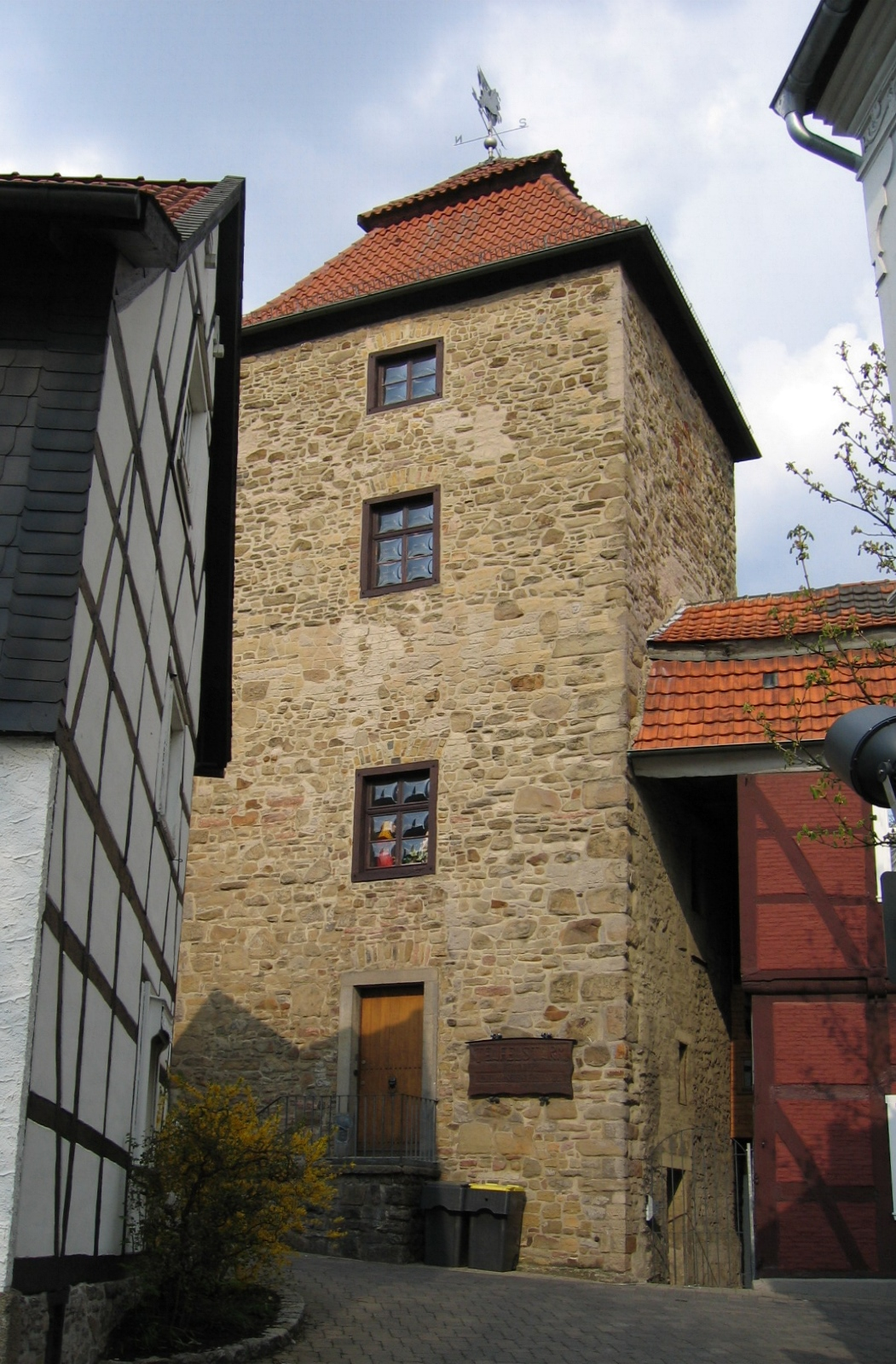 Description: Wehrturm (Teufelsturm) der alten Stadtmauer, erbaut 1276-1344, restauriert 1977-1981, Menden (Sauerland). Er beherbergt das "Museum der Westfälischen Fastnacht". Source: selbst fotografiert Date: 25. Apr. 2006 Author: Asio otus